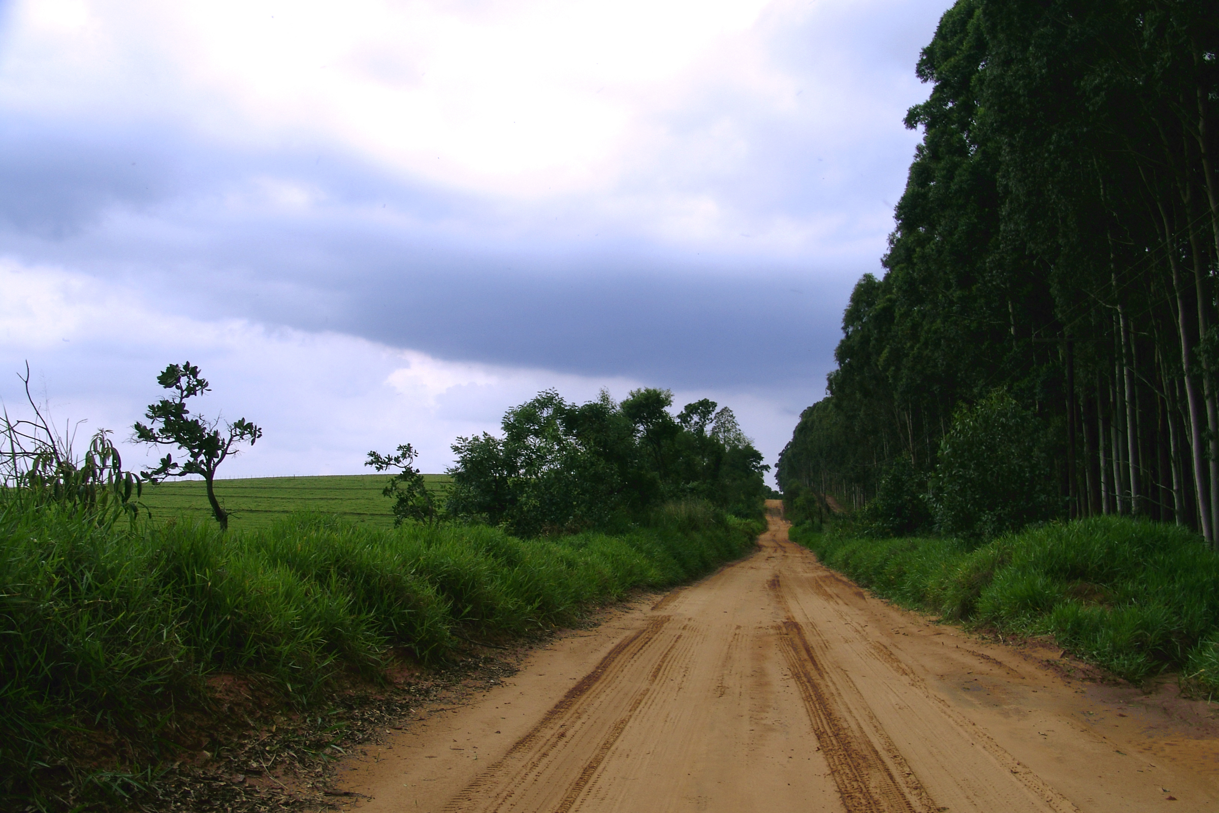 Rodovia do estado de São Paulo, SP-251 (Chico Landi), Avaré, São Paulo, Brasil